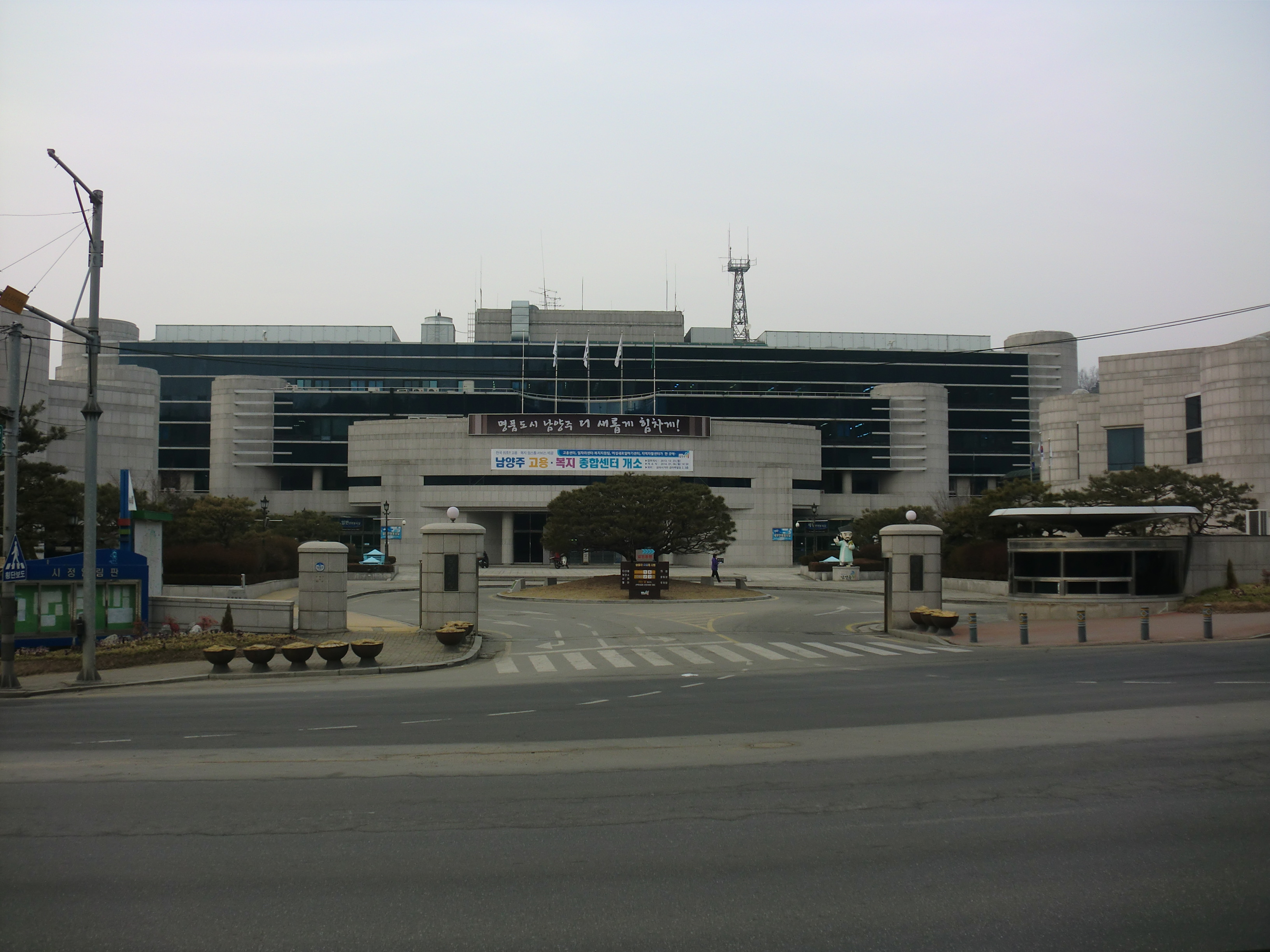 경기도 남양주시에 있는 남양주시청 제1청사